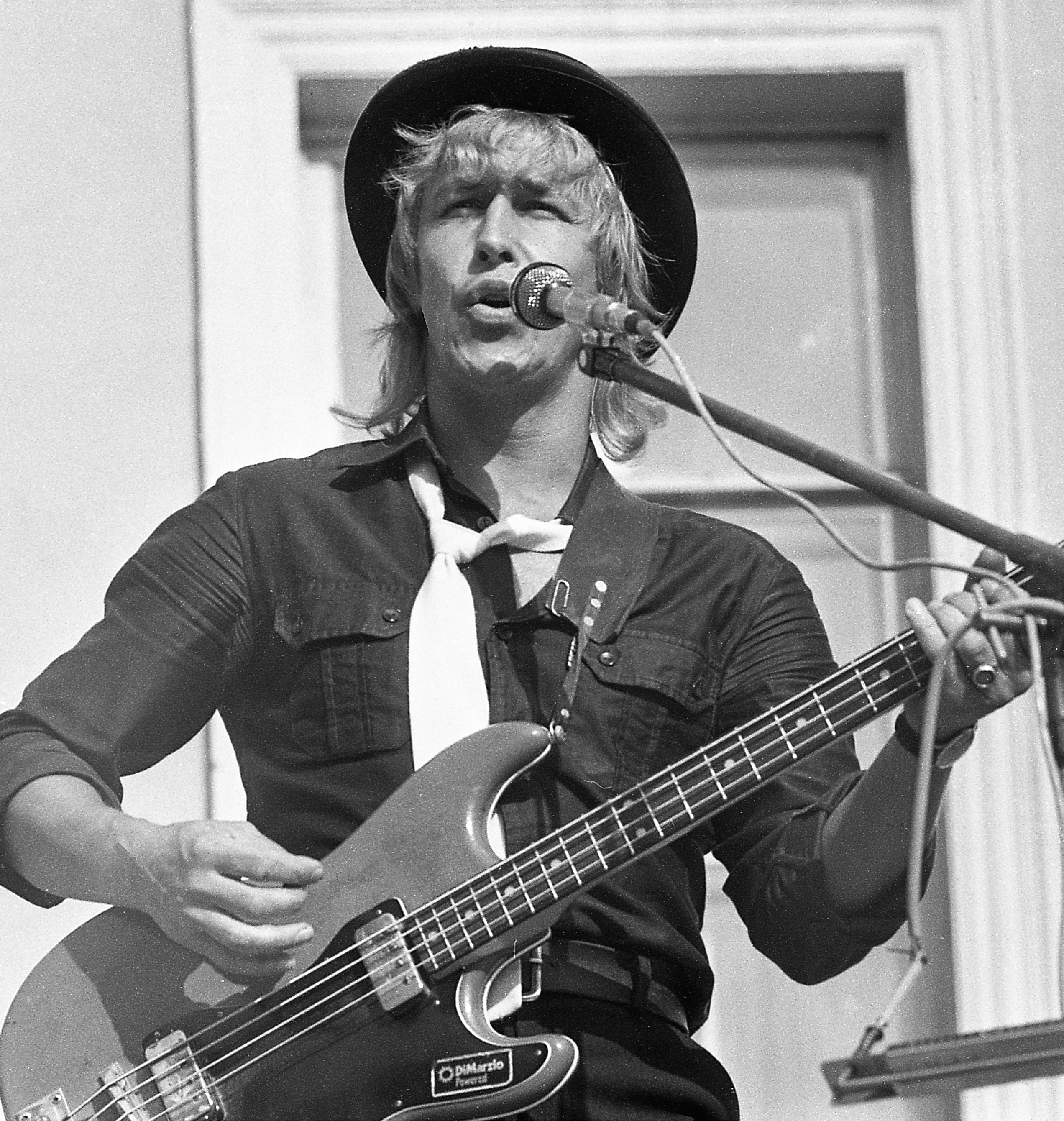 Lauri Nebel esinemas ansambli Hampelmann koosseisus.